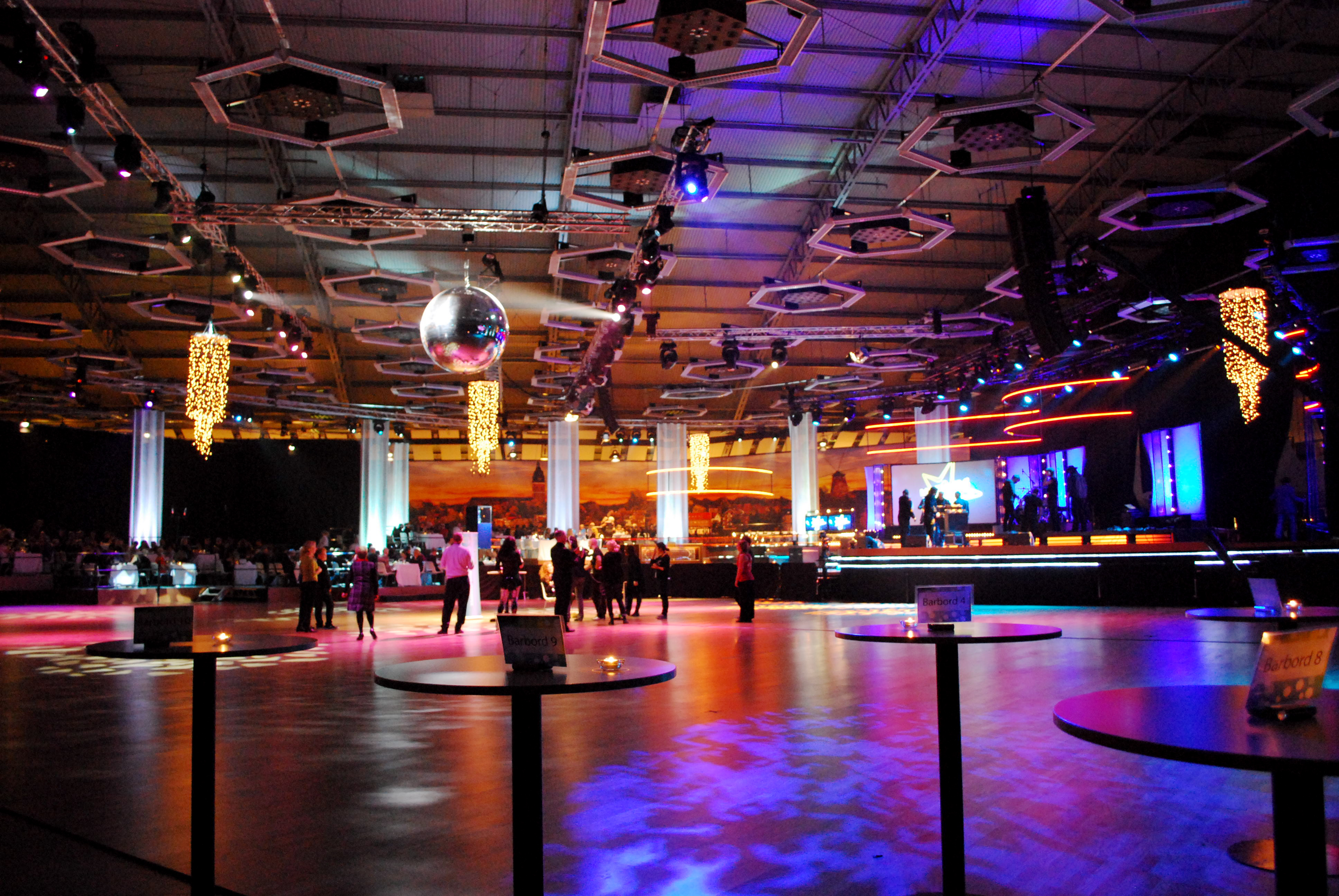 Studion i Strängnäs där Dansbandskampen 2009 spelades in